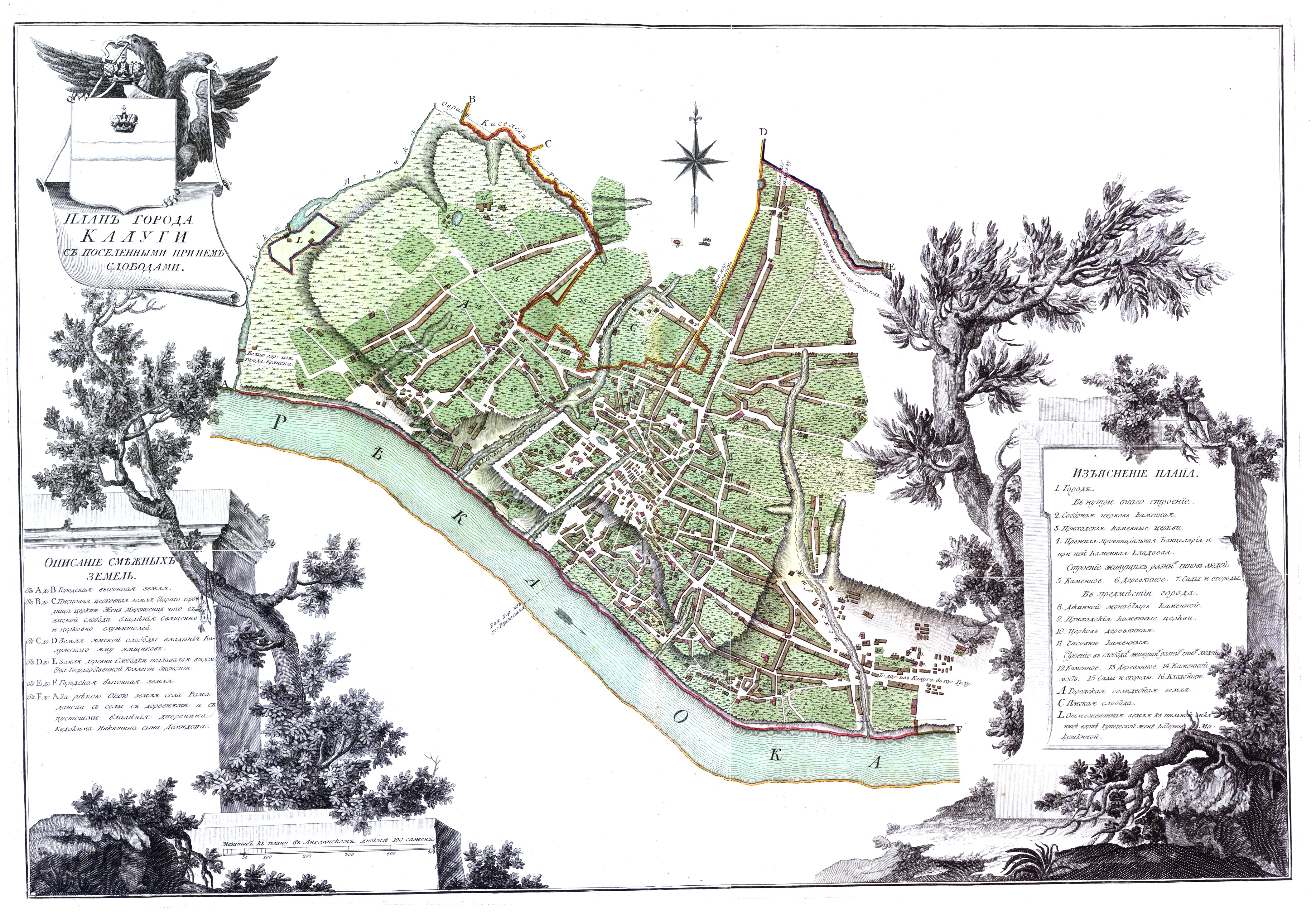 План города Калуги 1782 г.